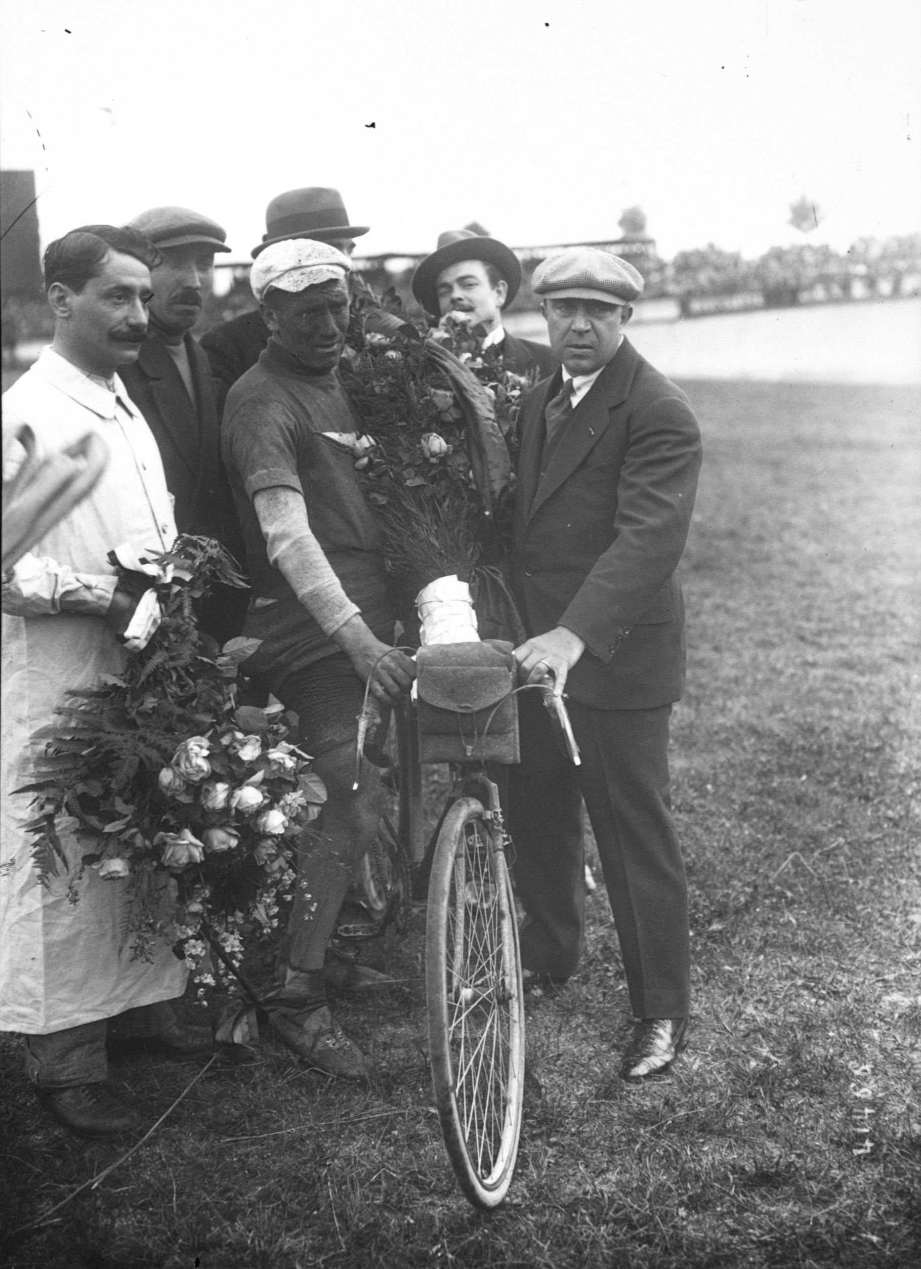 Philippe Thys à l'arrivée du Tour de France 1914